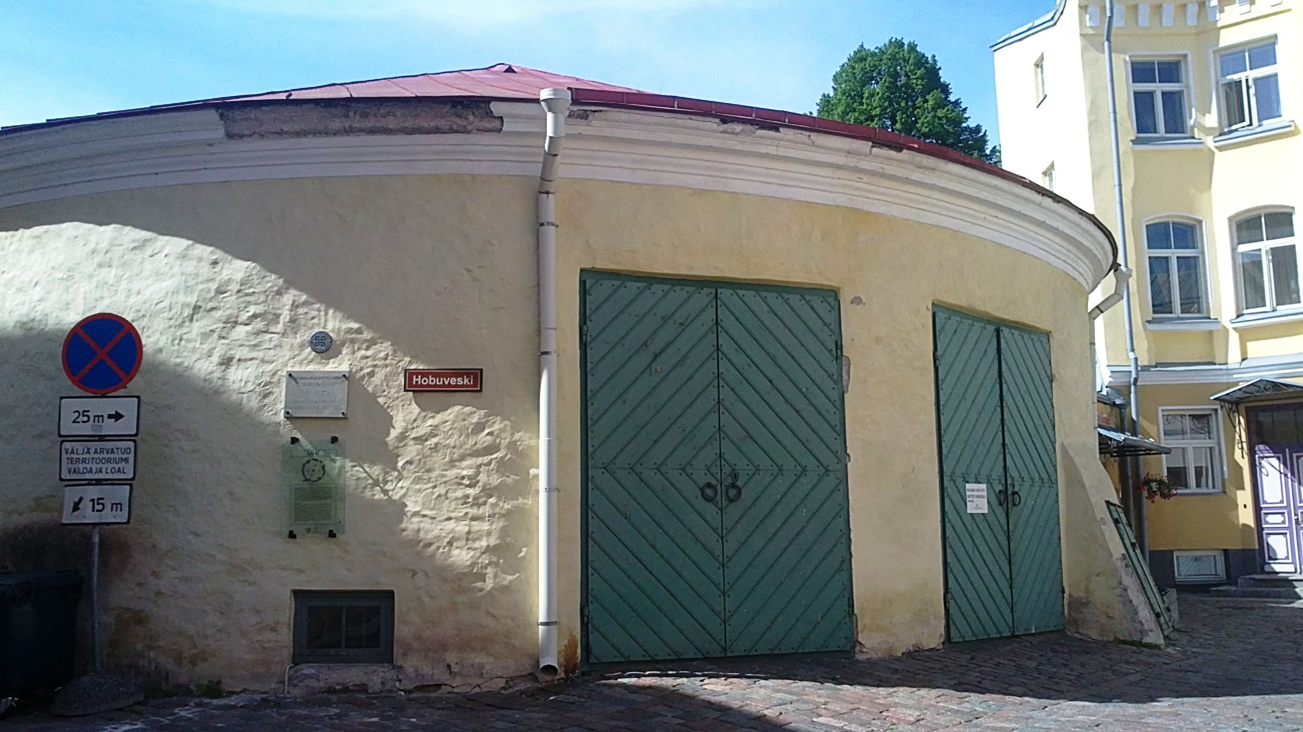 Tallinna vanalinnas, Lai tänav 47 asuv Tallinna hobuveski